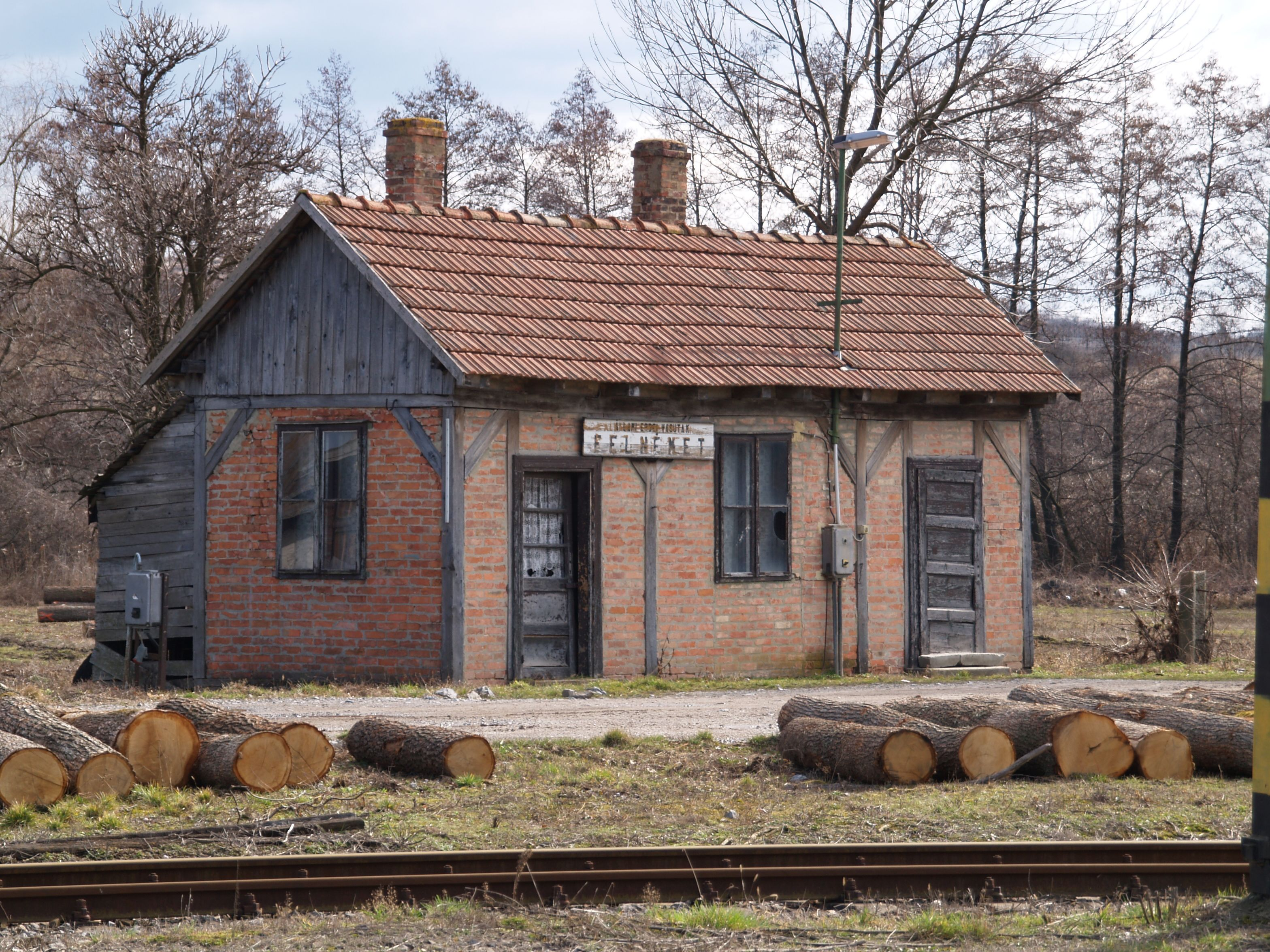 Felsőtárkányi Állami Erdei Vasút egykori Felnémet végállomásának épülete 2009-ben (Eger-Felnémet)